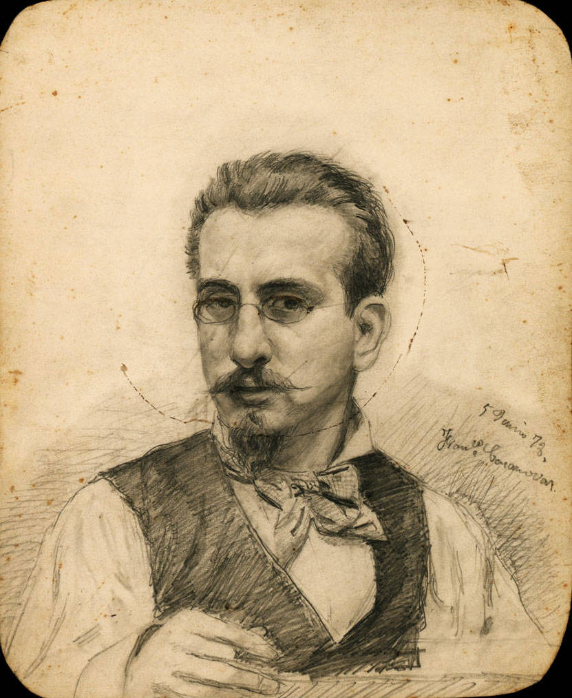 Autoretrat. Francesc Casanovas Gorchs (1878)